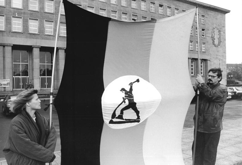 ADN- Peer Grimm 20.9.90 Berlin: Volkskammertagung zum Einigungsvertrag- Mit der Forderung "Schwerter zu Pflugscharen" vor dem ehemaligen ZK-Gebäude der SED, in dem die Volkskammer heute über den Einigungsvertrag abstimmt, wollen Gisela und Christian Freiwerk, Christen aus Neustadt an der Dosse, Verteidigungsminister Eppelmann an seine christliche Verantwortung erinnern.